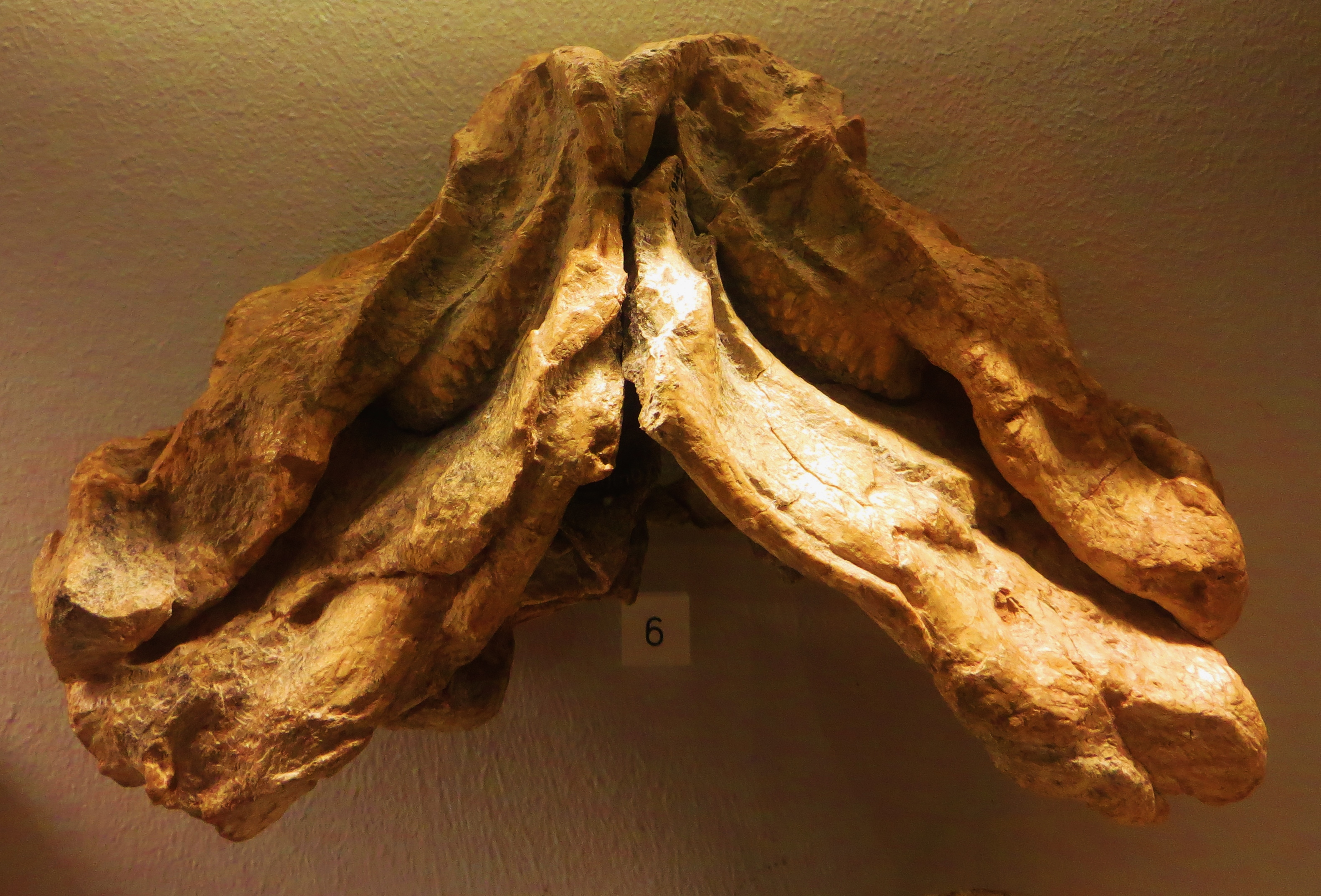 Fossil of Scaphonyx, an extinct reptile - Took the picture at Museum of Paleontology, Tuebingen